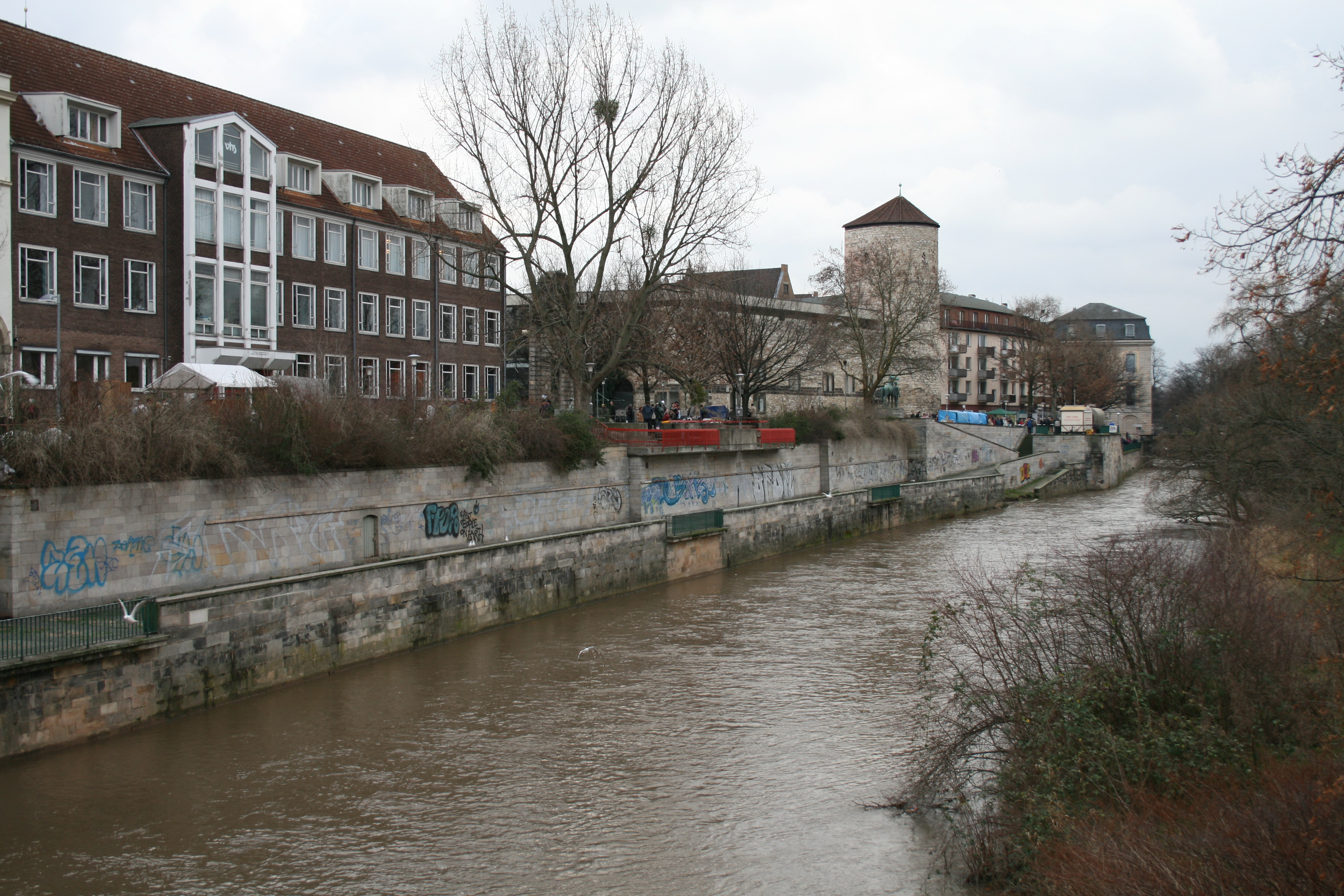 Am Hohen Ufer (Hannover), Niedersachsen, Deutschland